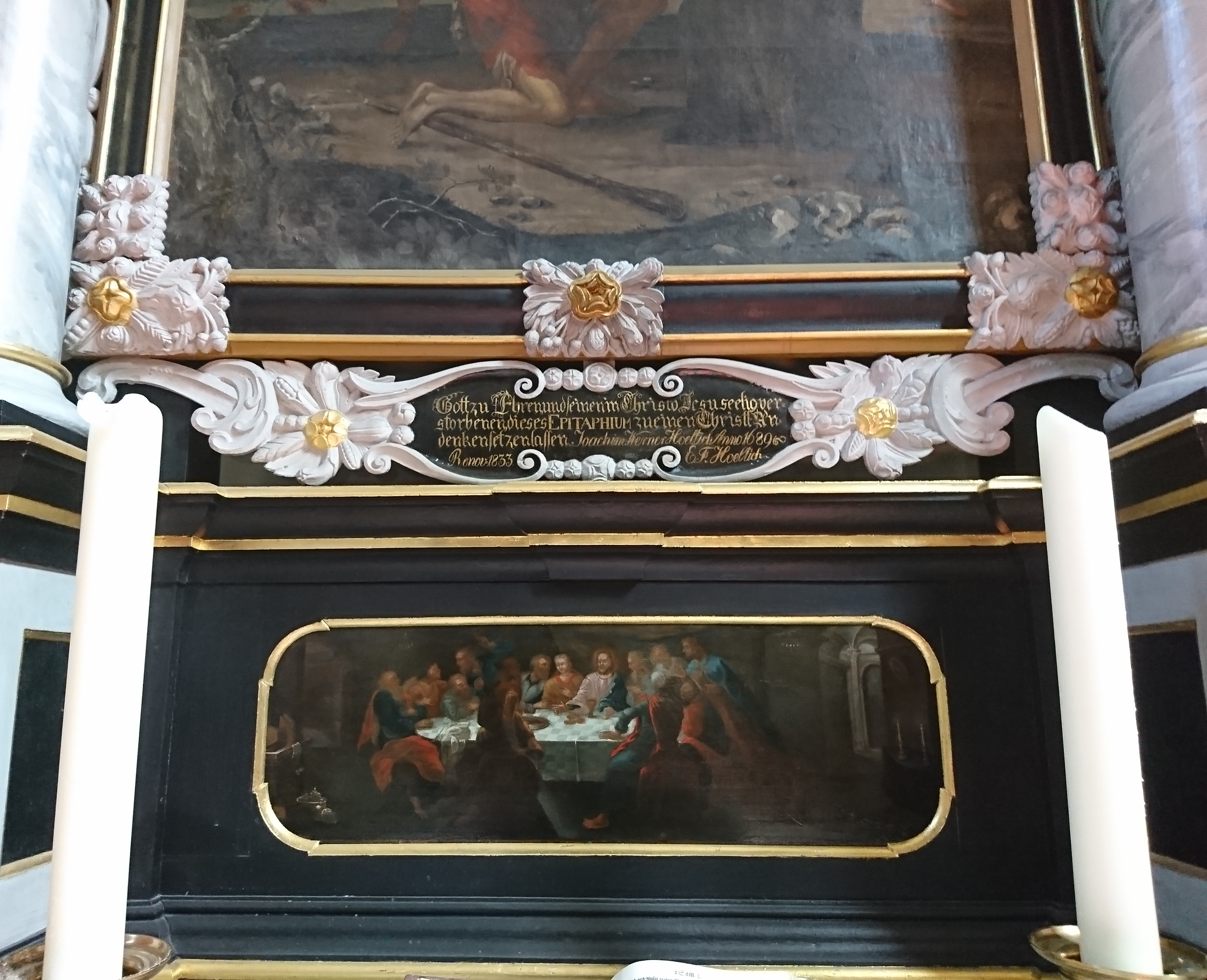 Inschrift Gemäldeepitaph Höltich, Altargemälde St. Nikolai, Mölln